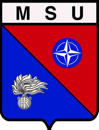 Logo della Multinational Specialized Unit dell'Arma dei Carabinieri